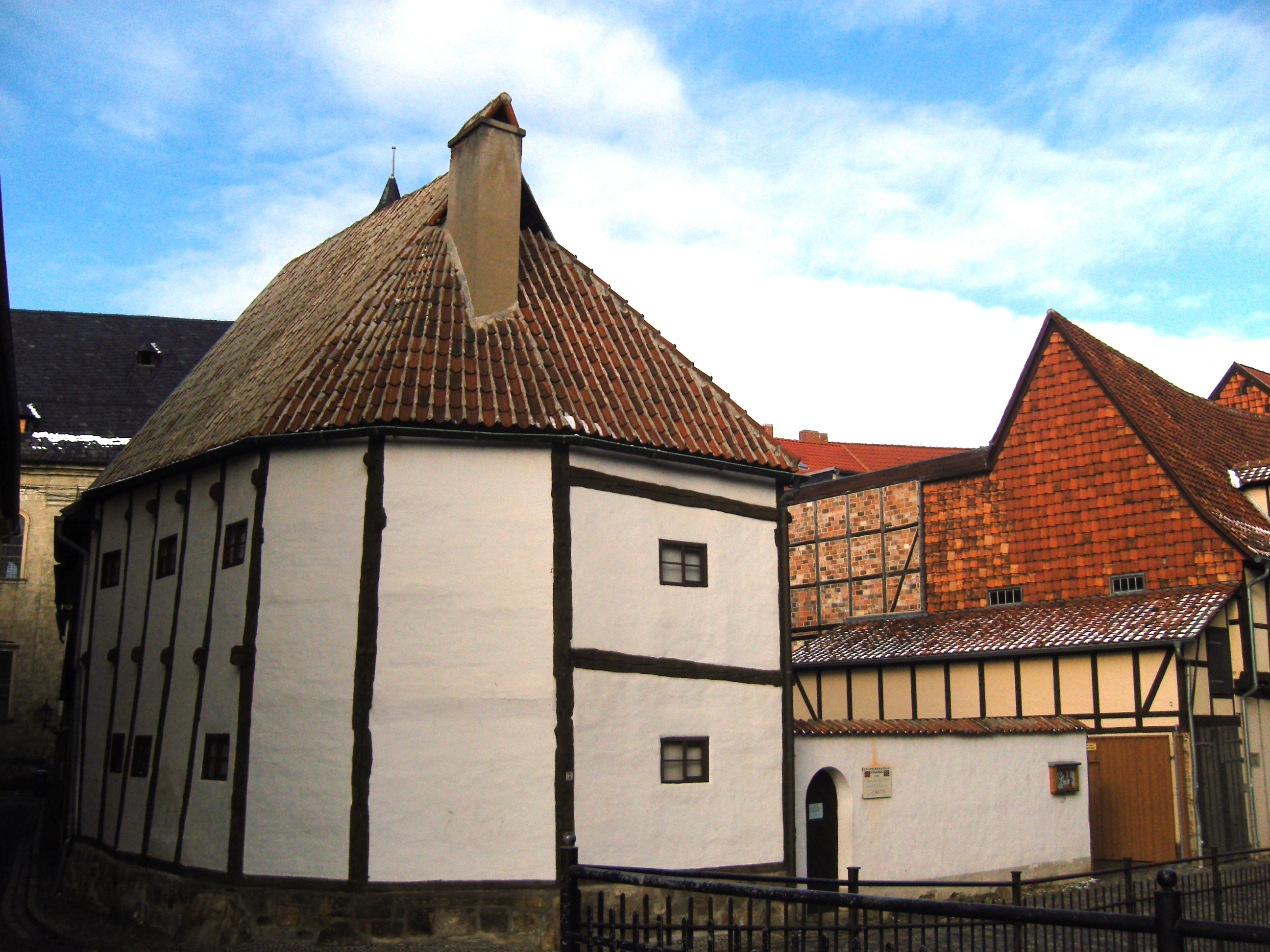 Denkmalgeschütztes Ständerhaus in der Wordgasse in Quedlinburg